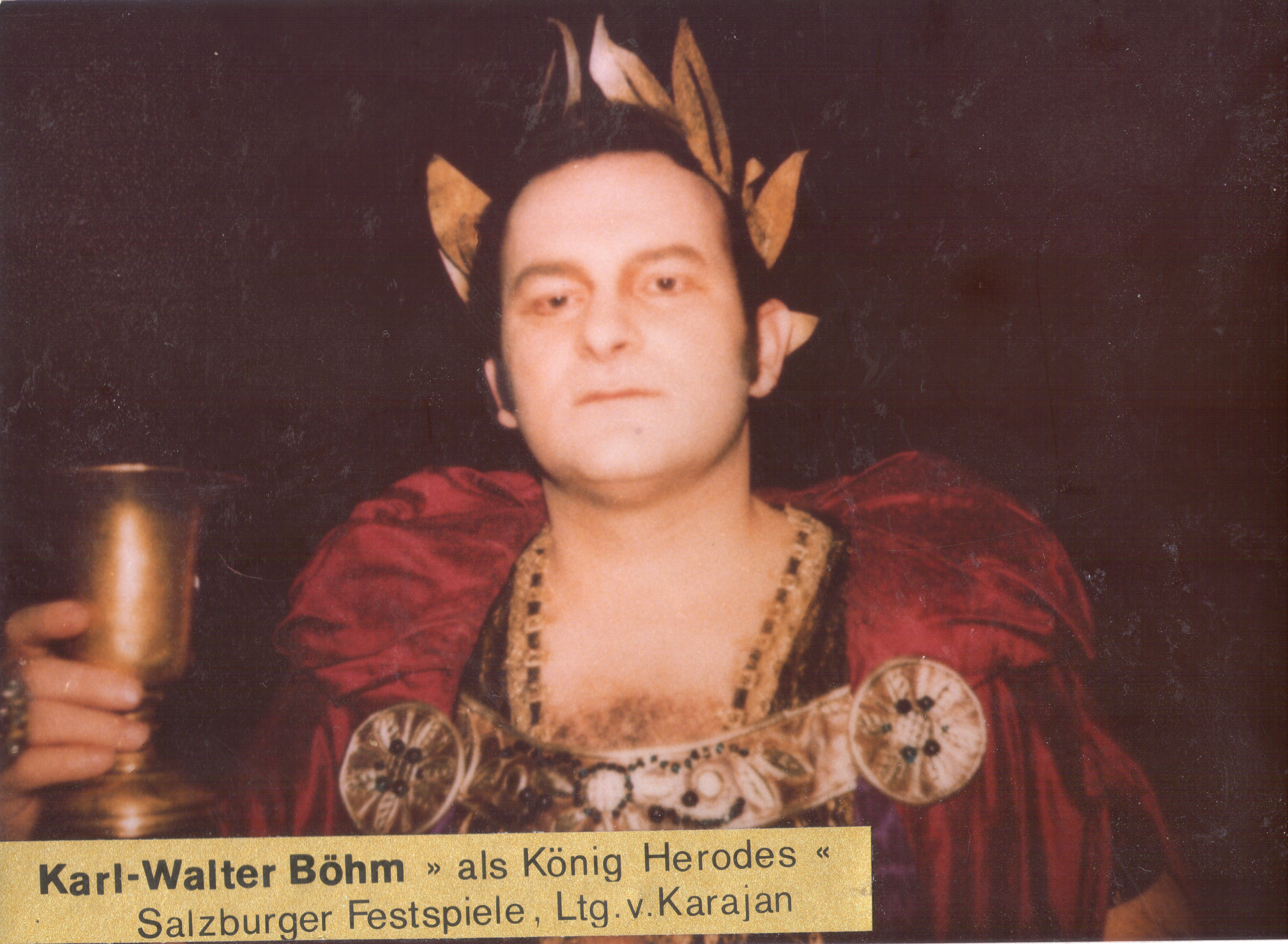 K.W.B. als Herodes /Salzburger Festspiele /unter Leitung H.von Karajan